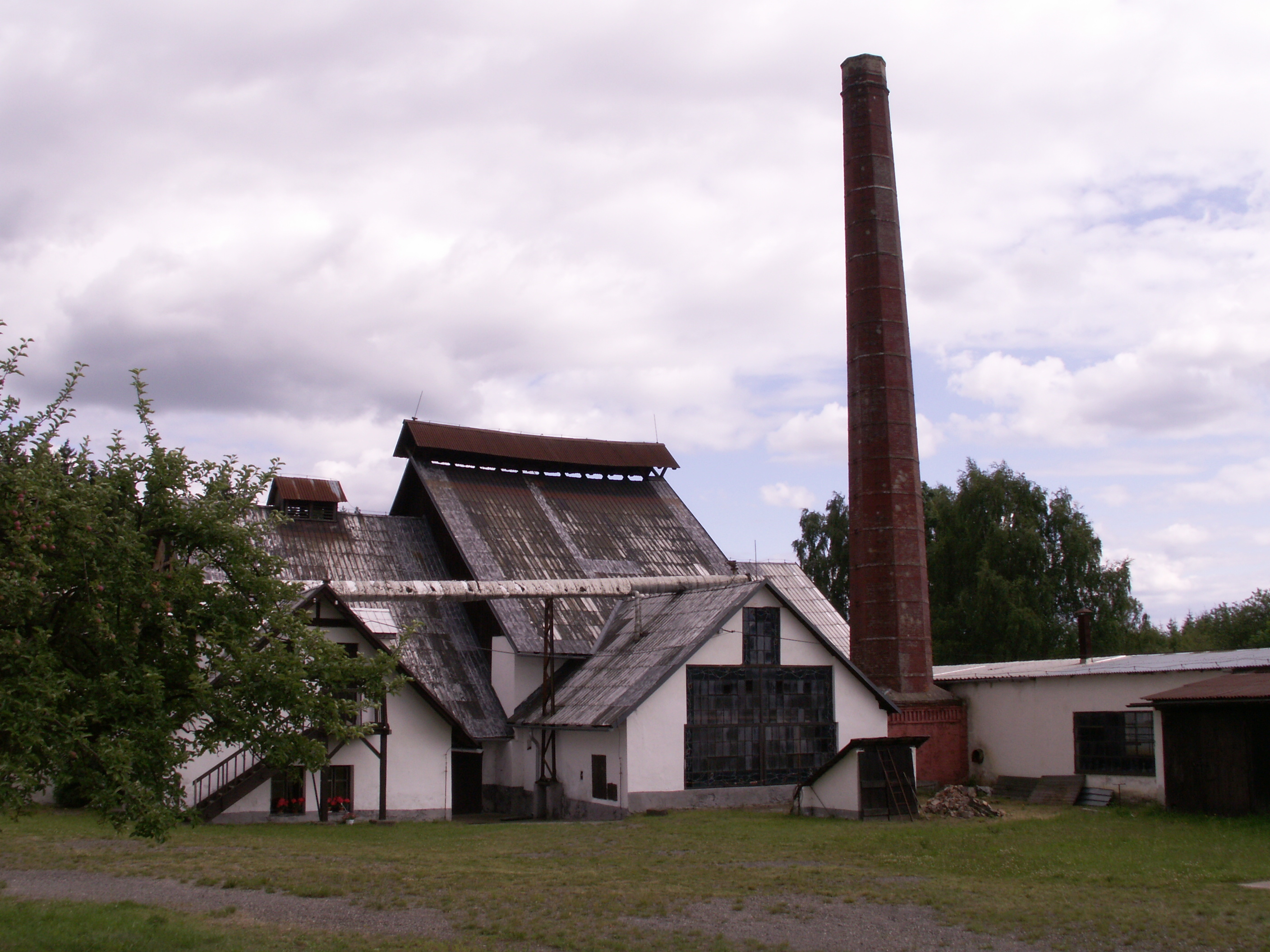 Bělá-Tasice, okres Havlíčkův Brod. Sklářská huť z konce 18. století, celkový pohled.